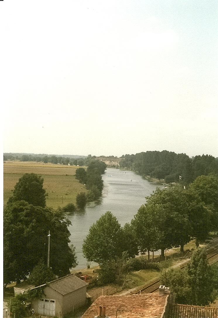 La vallée de la Charente vue depuis les hauteurs de Taillebourg (Charente-Maritime).